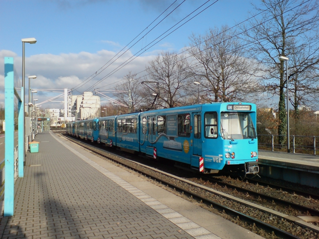 U-Bahnstation Industriehof/Neue Börse, Bockenheim, Frankfurt am Main, U6 Richtung Praunheim Heerstraße, im Hintergrund: Studentenwohnheim Friedrich-Dessauer-Haus (Hausen)